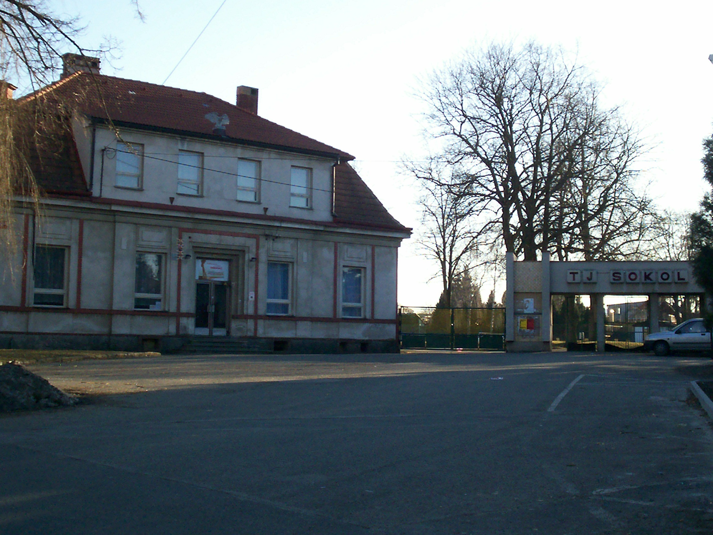 Blovická Sokolovna z Tyršovy ulice, 2011